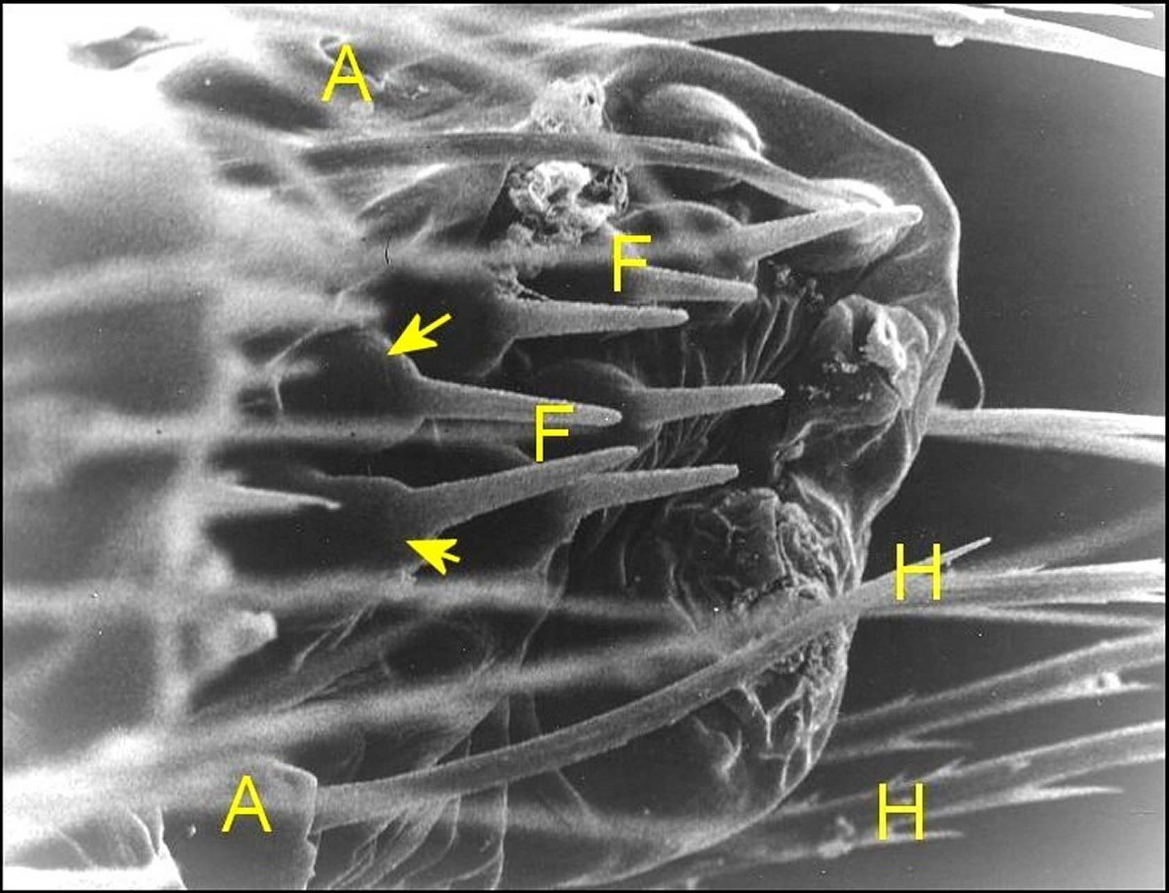 Filières médianes d' Argyrodes sp., avec les fusules et des poils